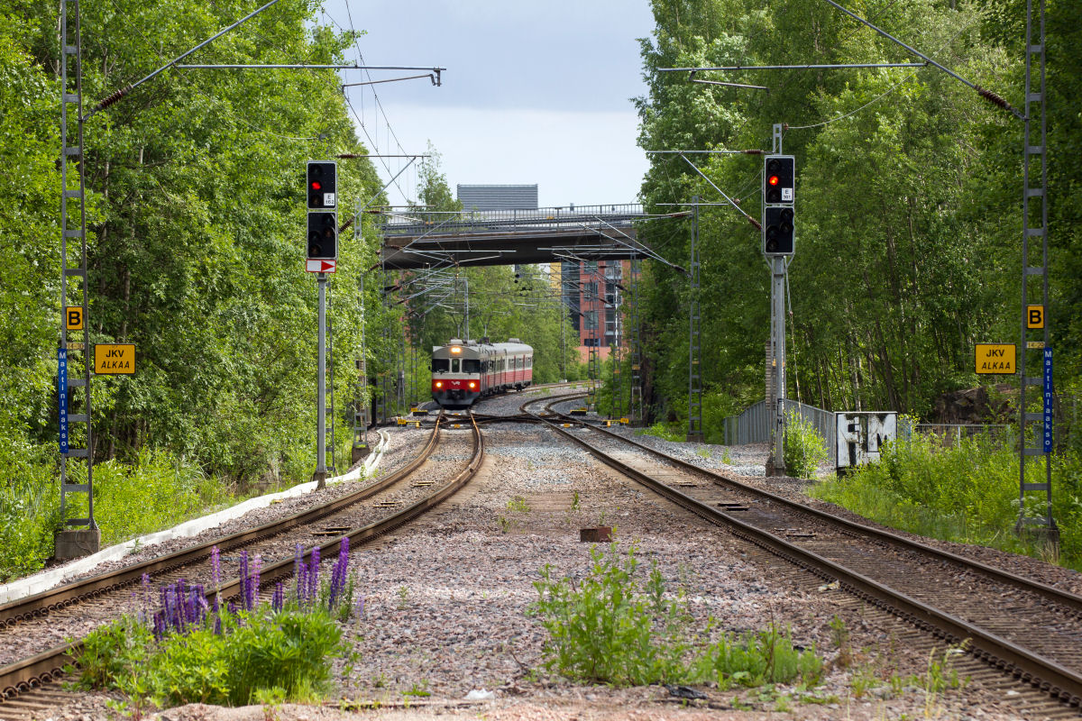 Sm2 ja Sm1-yksiköstä koostuva M-juna saapuu Vantaankosken asemalle.